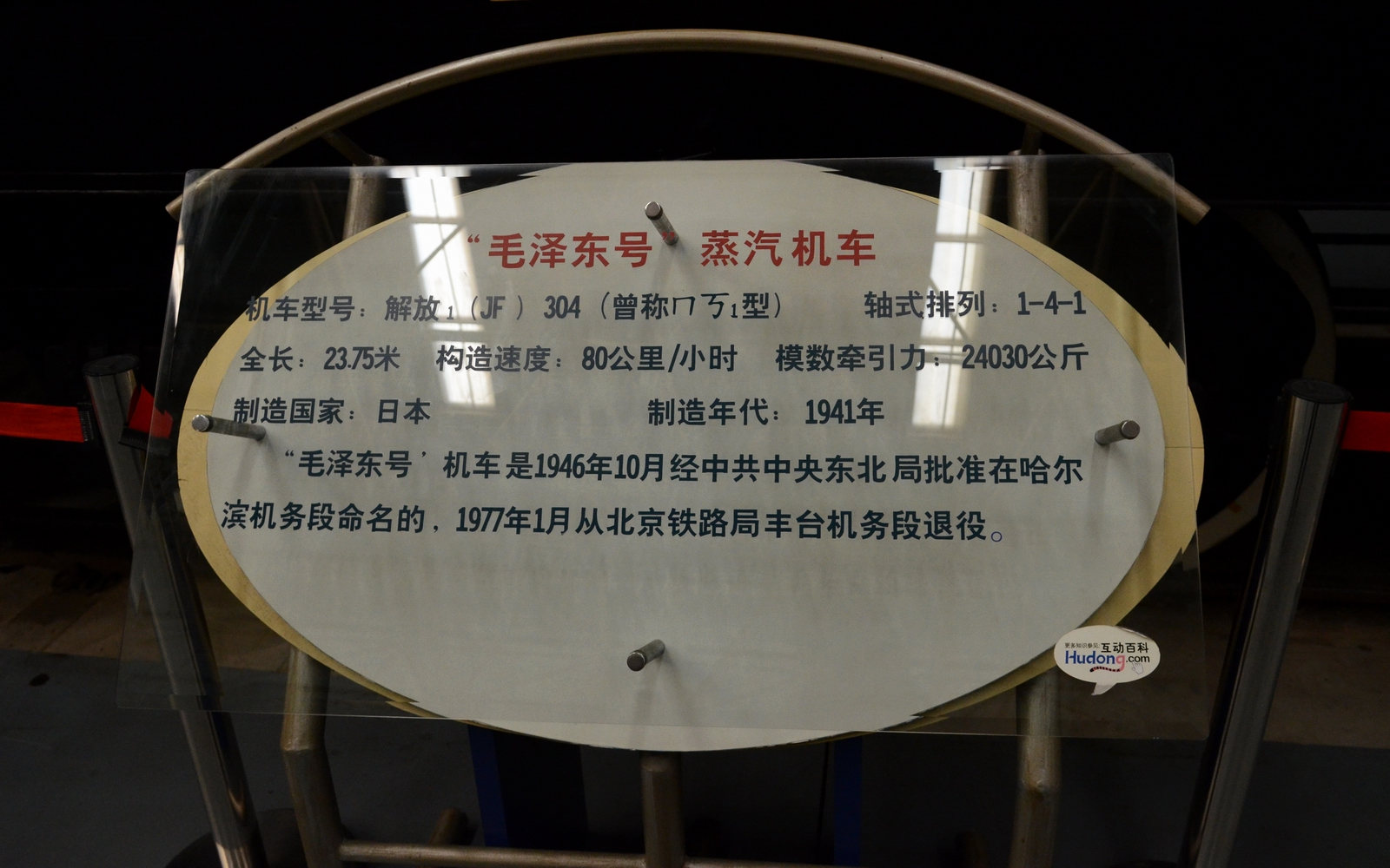 保存在中国铁道博物馆的解放1型（JF）304号“毛泽东号”蒸汽机车的简介牌